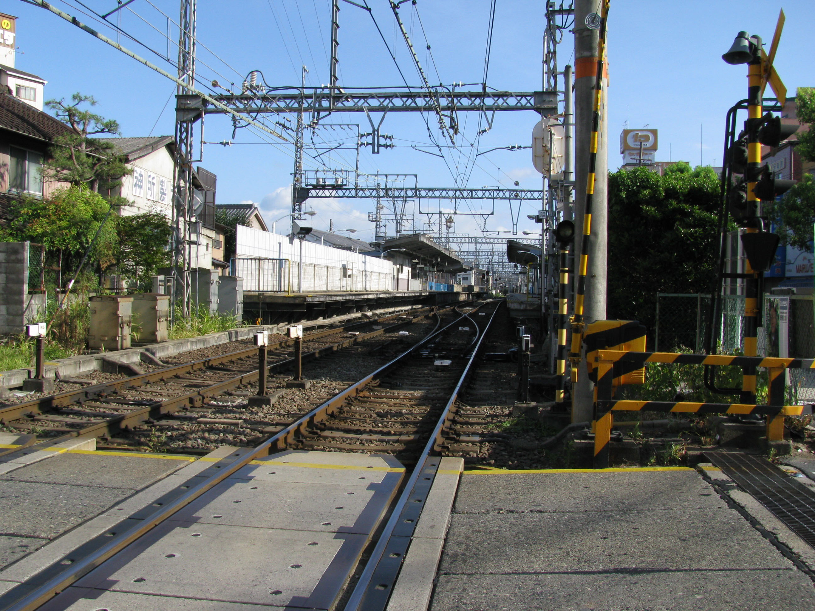 近鉄橿原線八木西口駅